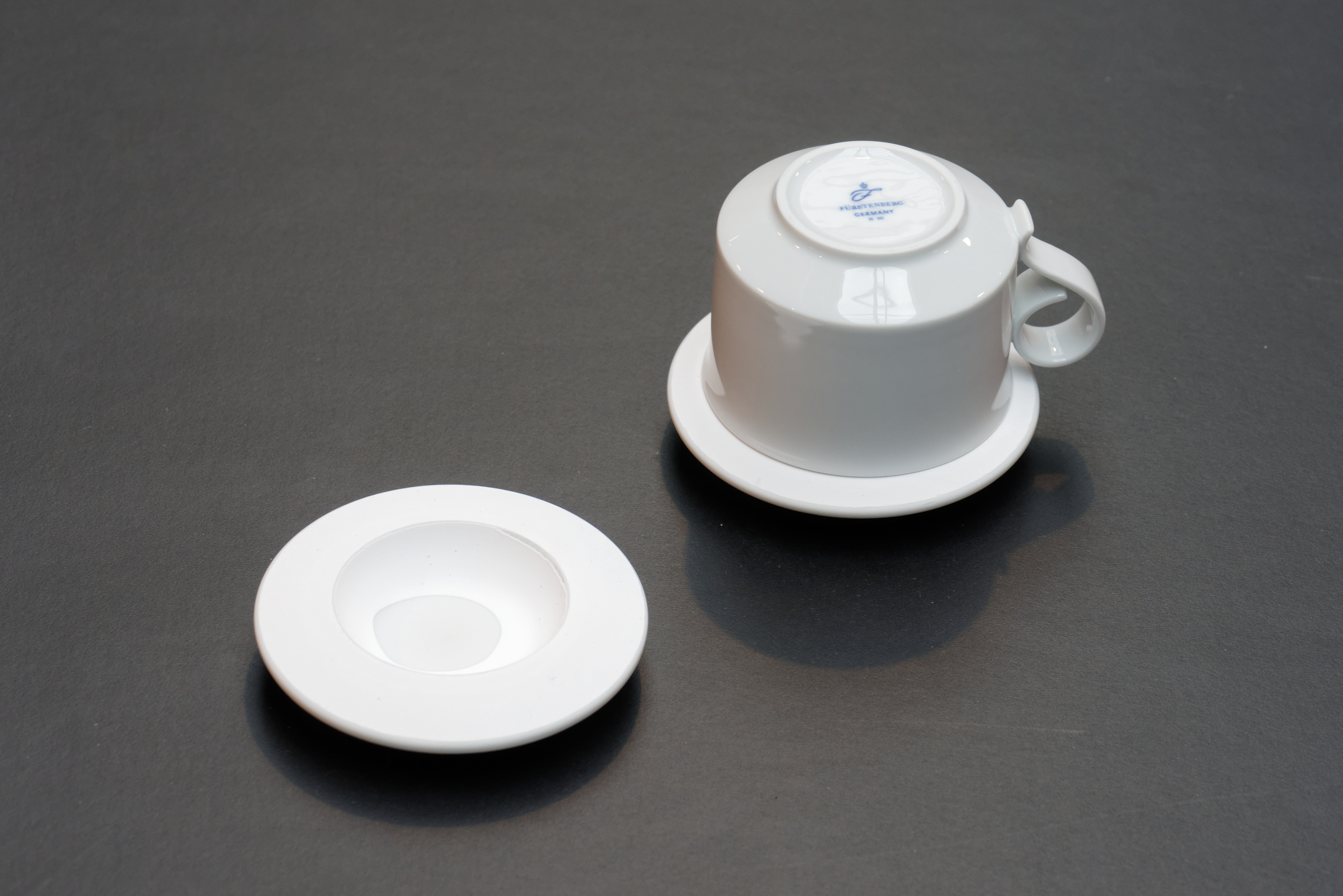 Eine Bomse ist ein Untersatz für ein zu brennendes Objekt, hier eine Tasse auf einer Bomse